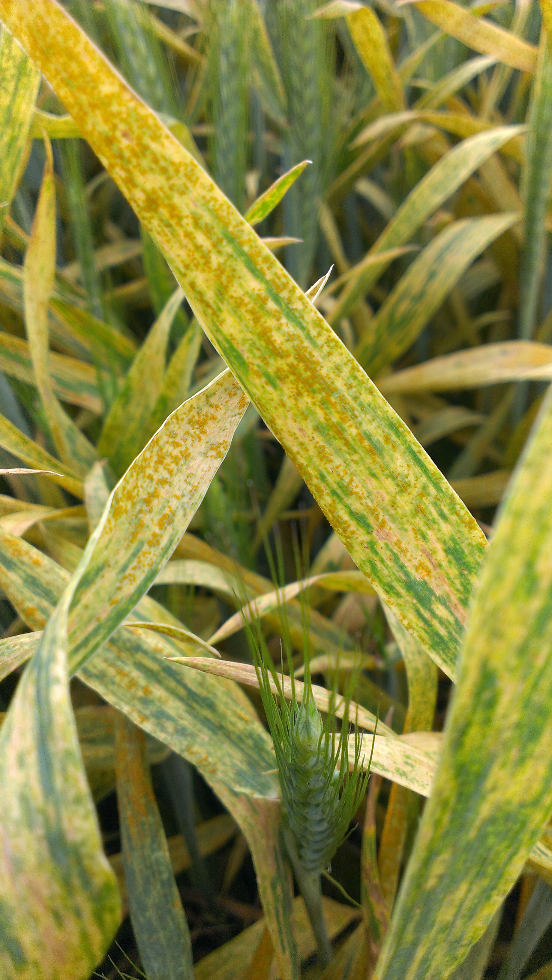 Dzeltenā rūsa uz ziemas tritikāles lapām.